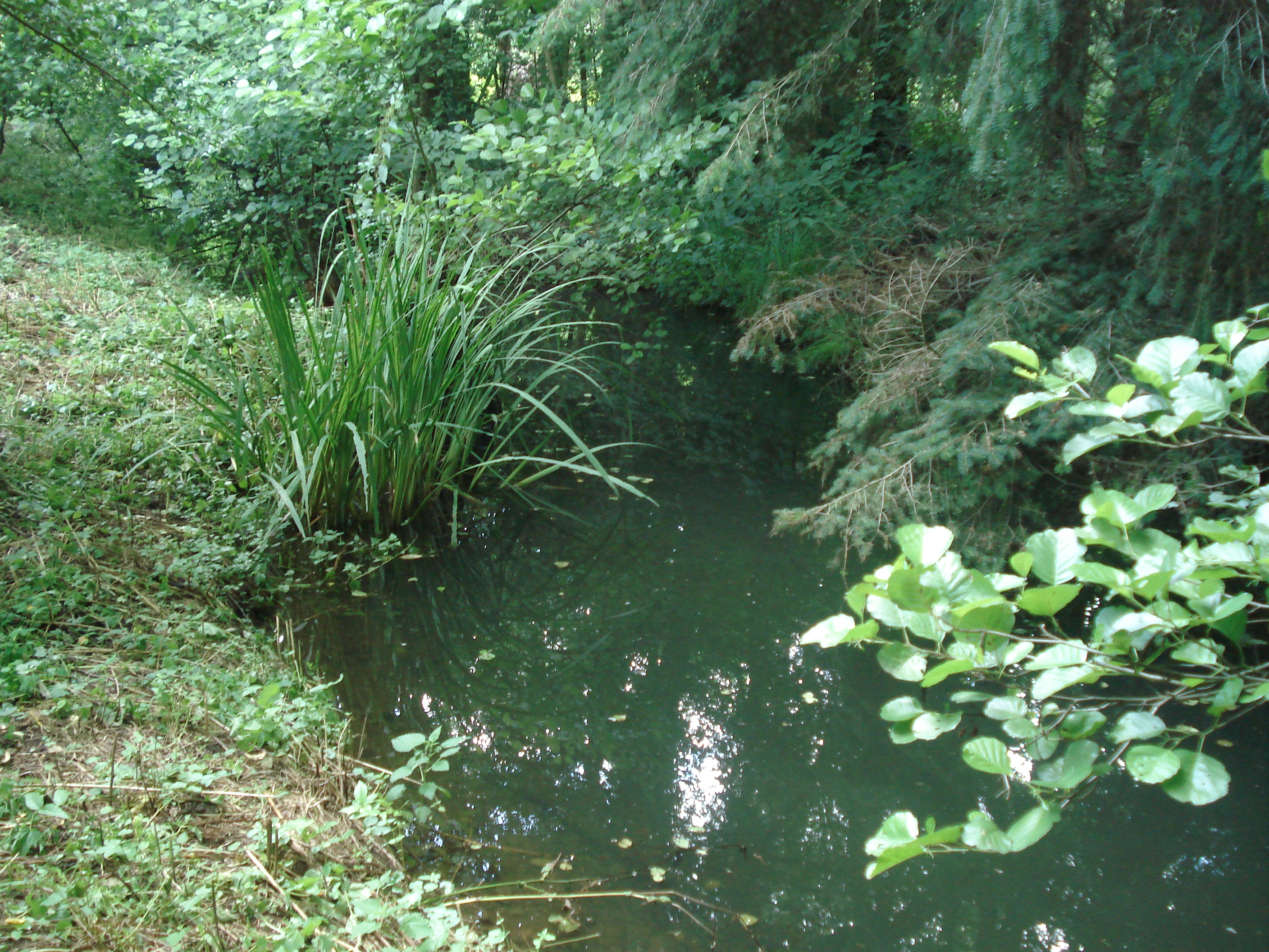 Der Romesbach nordwestlich von Stockstadt